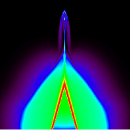 Températures dans un jet moléculaire d'étoile jeune t=1920 ans